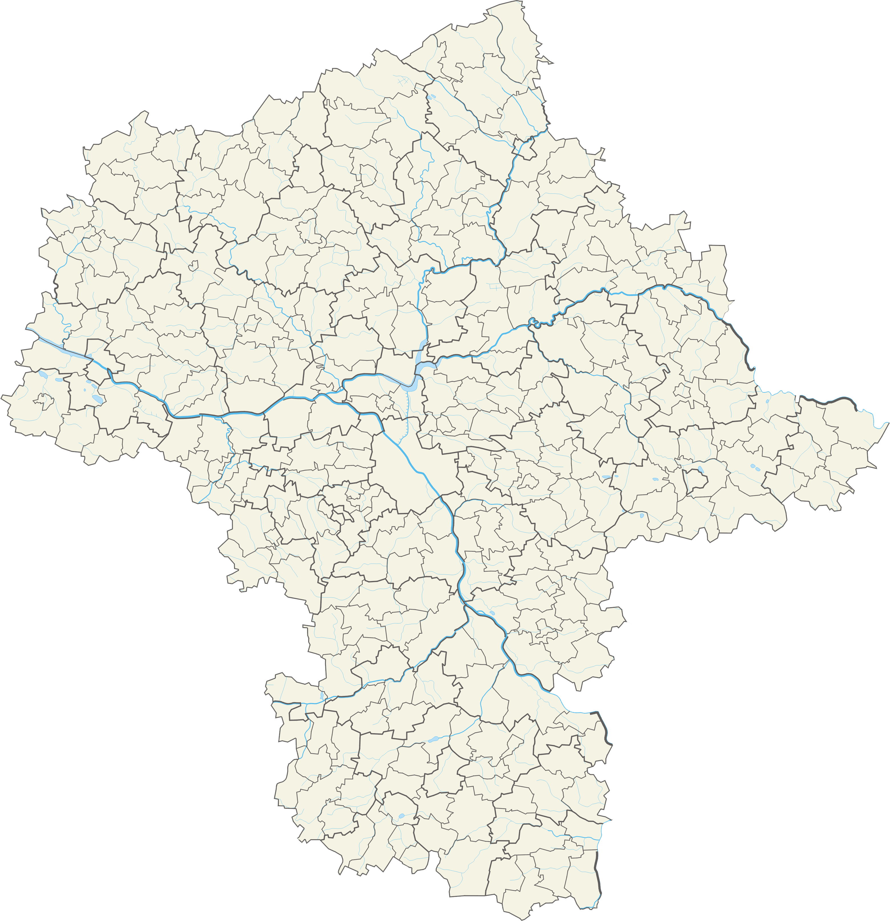 Województwo mazowieckie – powiaty i gminy Współrzędne graniczne mapy: N: 53.4817° N S: 51.0131° N W: 19.2596° E E: 23.1284° E